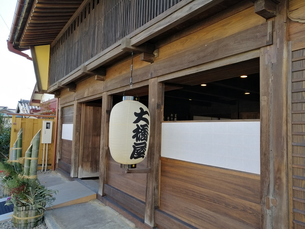 Oohashiya Museum, Toyokawa